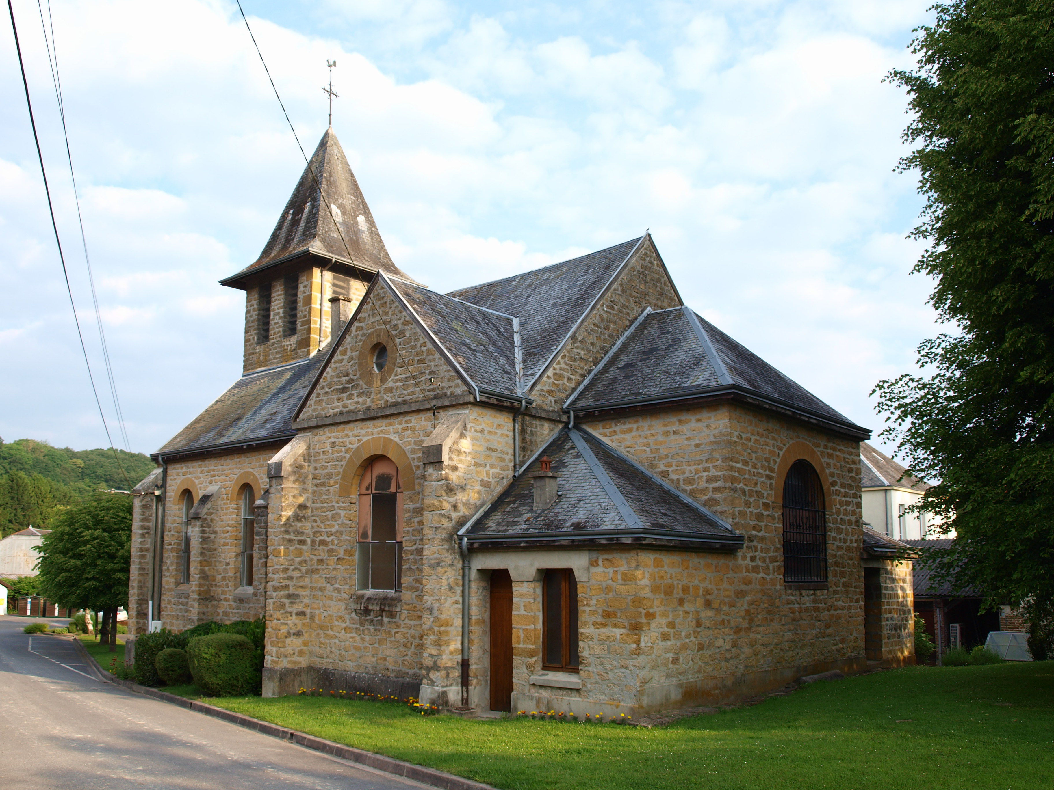 Toges (Ardennes, France) ; église